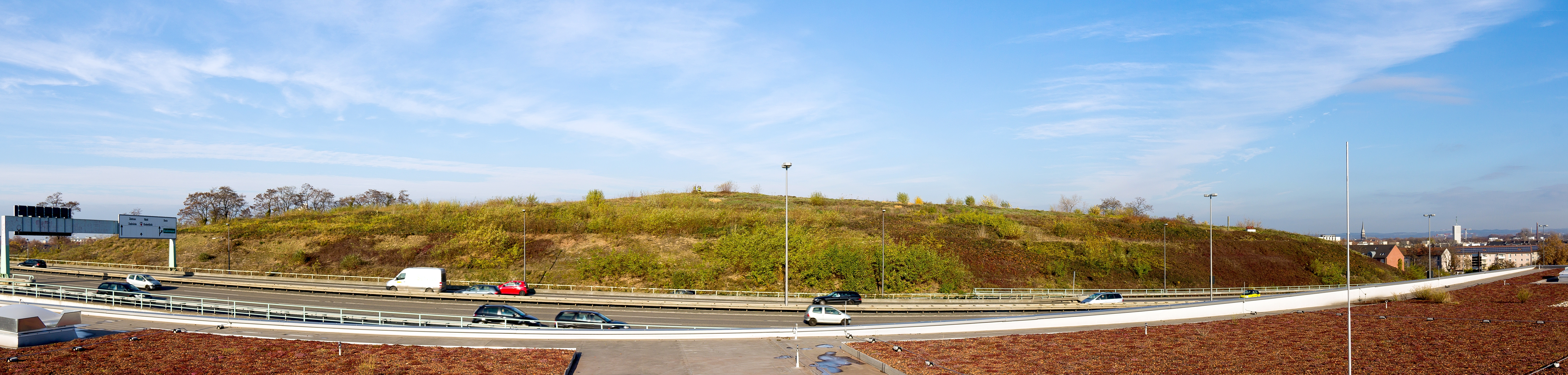 Der Kalkberg, eine künstliche Erhebung in der Stadt Köln. Panorama-Aufnahme vom Dach des Music Stores. Dazwischen führt die Stadtautobahn.